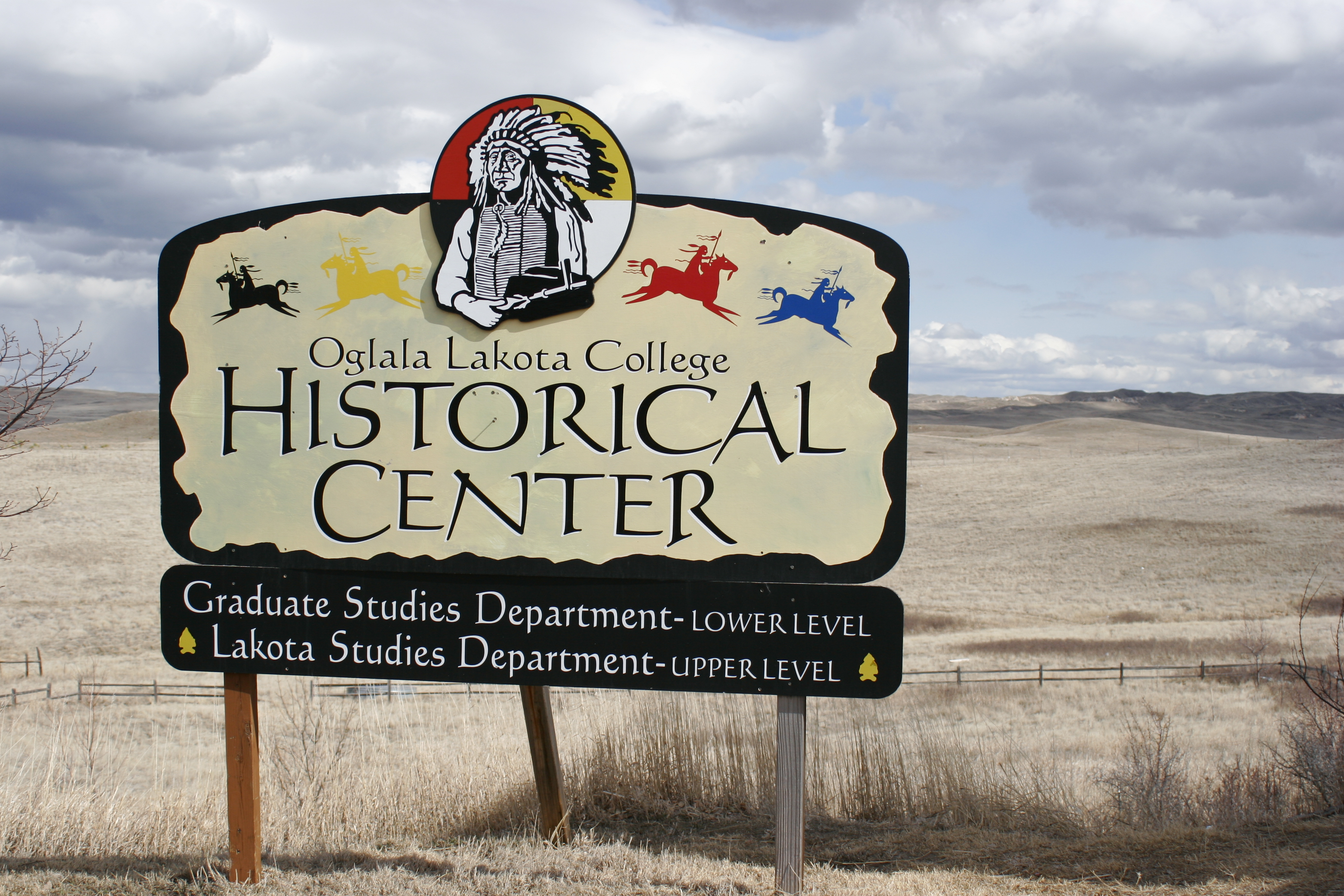 _MG_6876